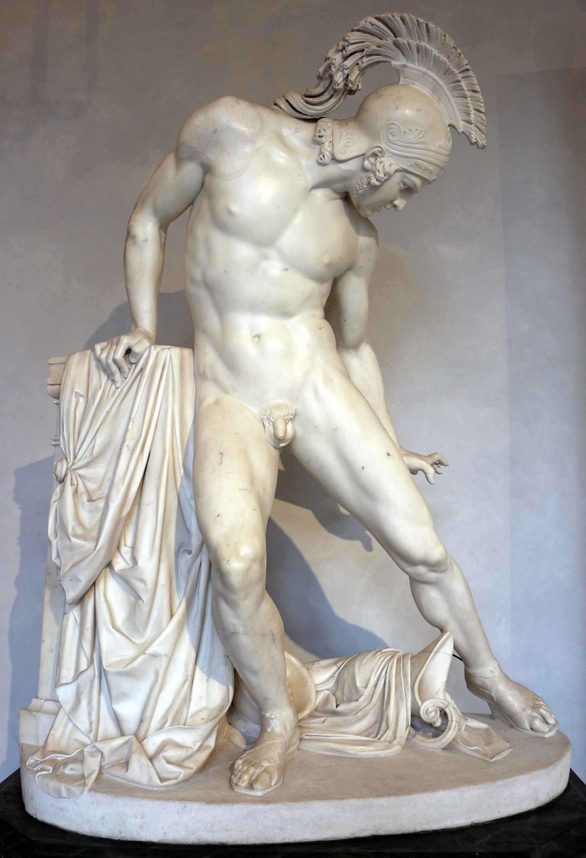 Sculptures in the Civica galleria d'arte moderna (Milan) This is a photo of a monument which is part of cultural heritage of Italy.